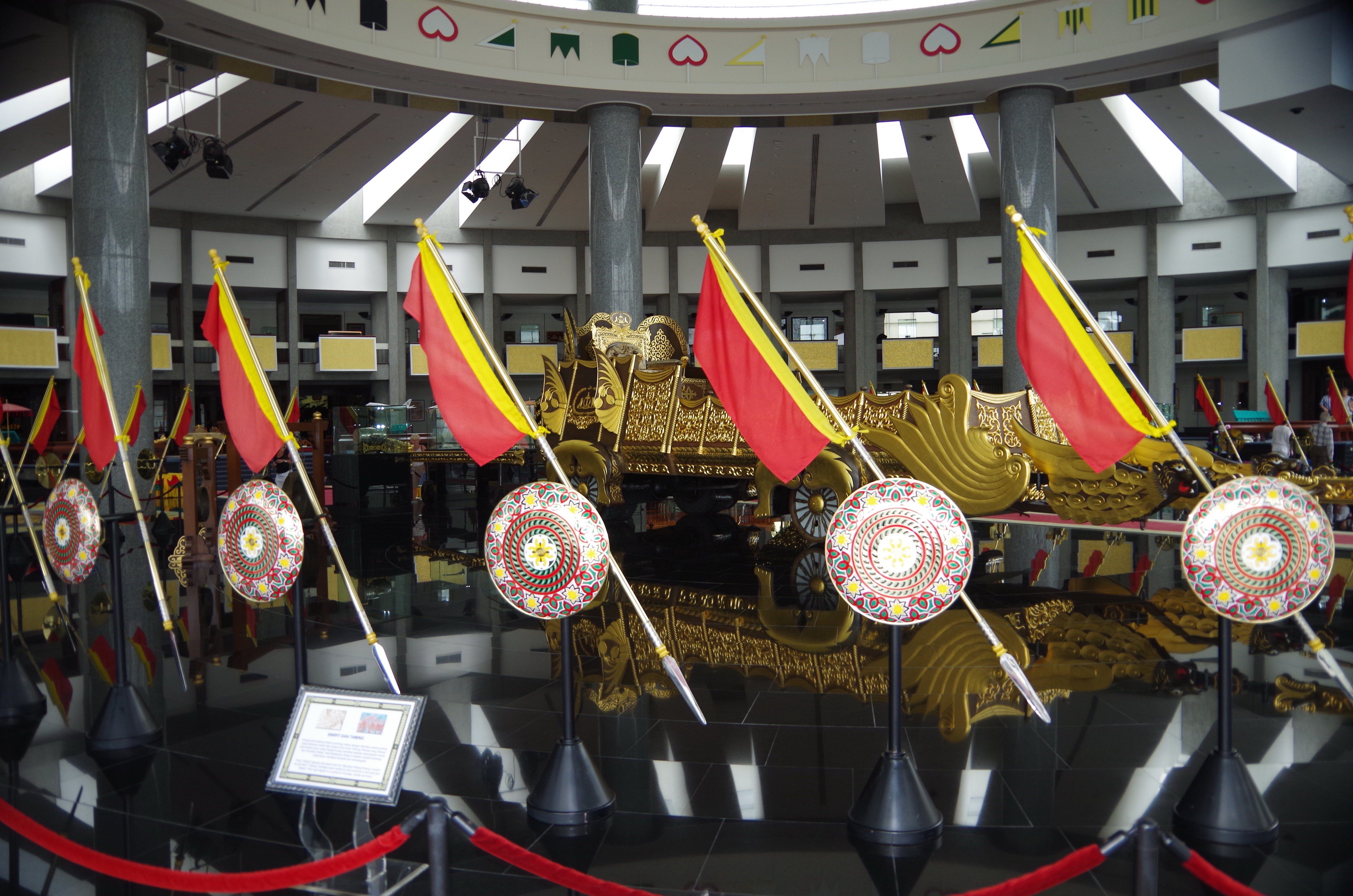 Wagen des Sultans, Royal Regalia Building